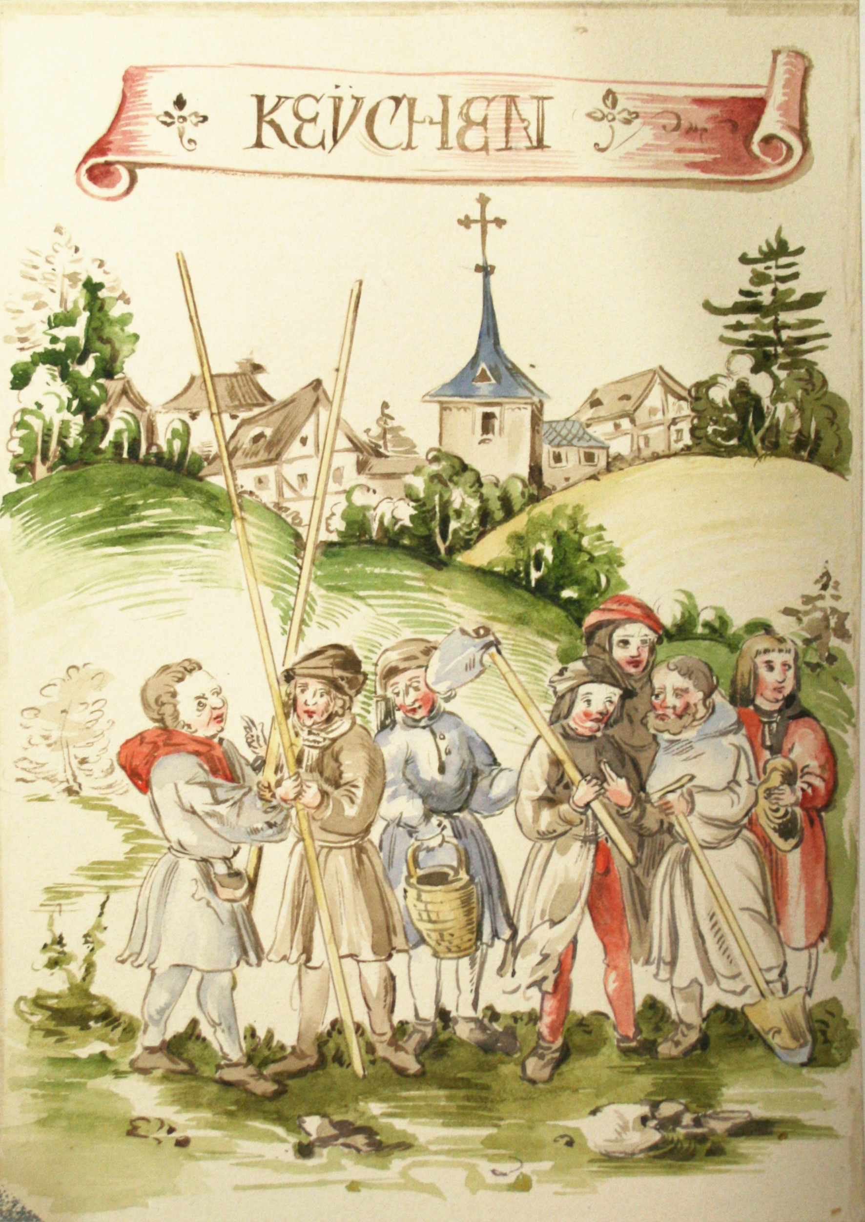 Illustration aus dem Salbuch des Klosters Naumburg: Die Landscheider mit ihrem Werkzeug, im Hintergrund die Ortschaft Kaichen.